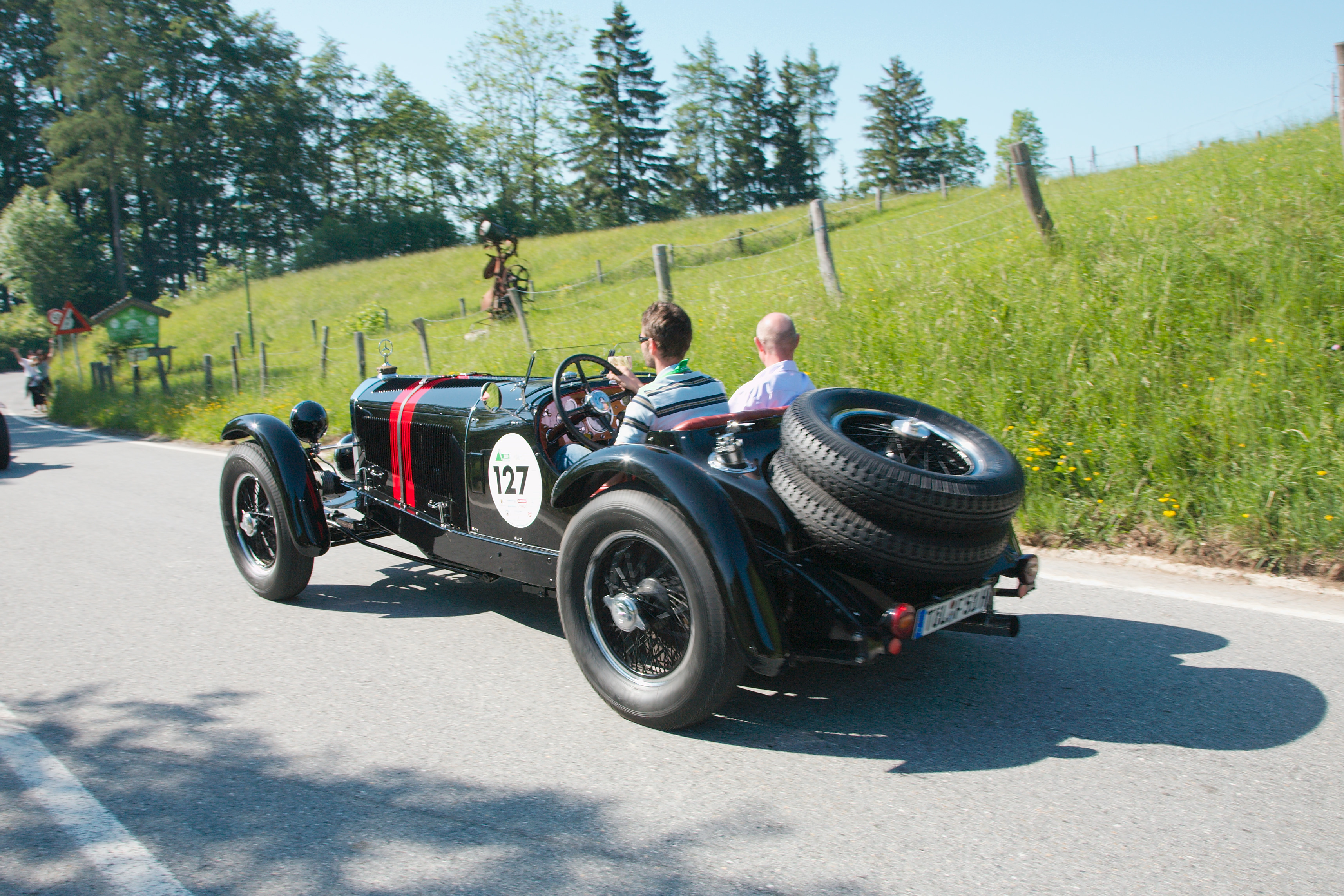 Mercedes-Benz 720 SSK from 1929 at Gaisbergrennen 2009